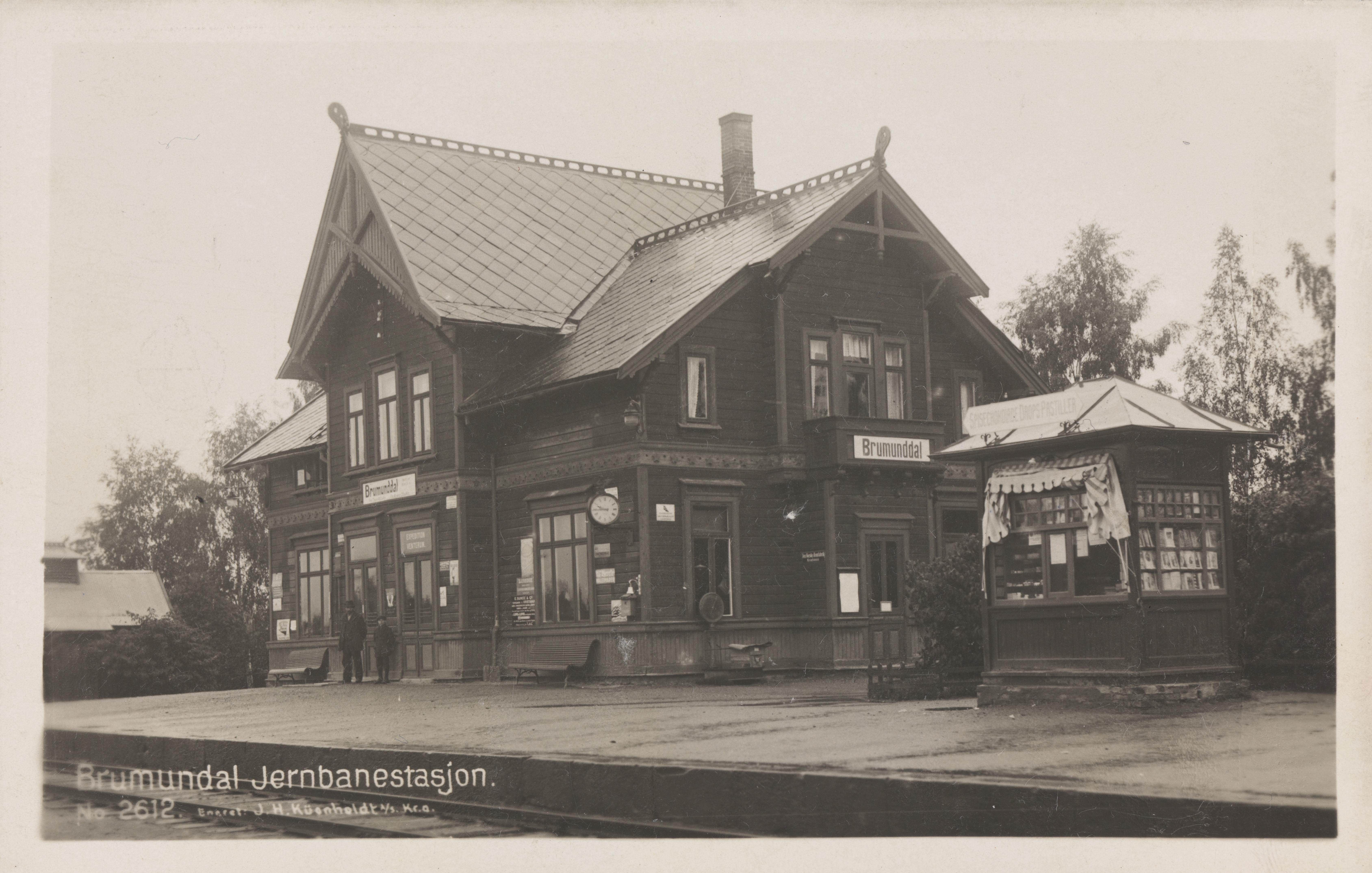 Bildet er hentet fra Nasjonalbibliotekets bildesamling. Brumundal stasjon, Ringsaker, Hedmark. Bildet er formodentlig fra før 1923, da stasjonsbygningen fikk stående panel det året ifølge NSBs bygningsregistrering.